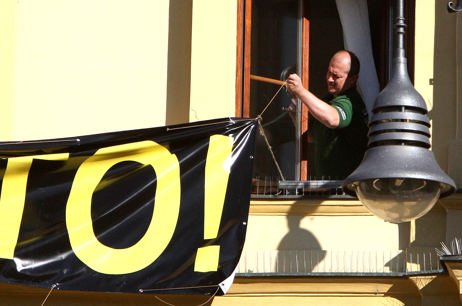 Župan Banskobystrického samosprávneho kraja Marian Kotleba a riaditeľ tlačového odboru Miroslav Belička v piatok ráno 29. 8. 2014 osobne vyvesili na župnú budovu na Námestí SNP veľký transparent „Yankees go home! Stop NATO!“[1]